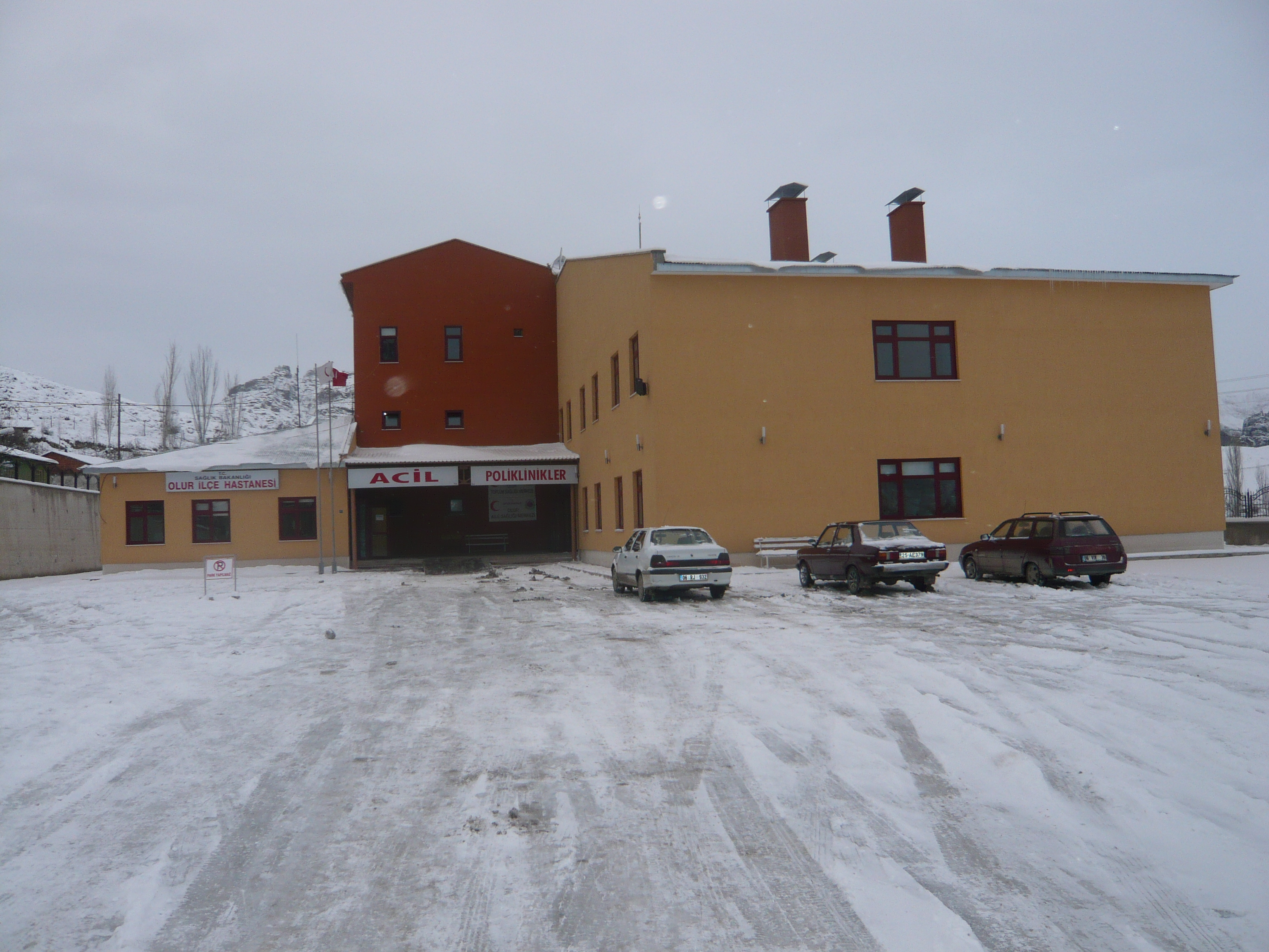 olur ilçe hastanesi